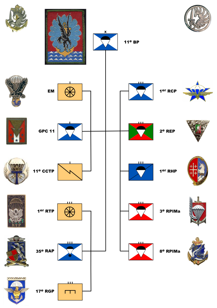 Organigramme de la 11e BP en 2011. d'après info du site officiel